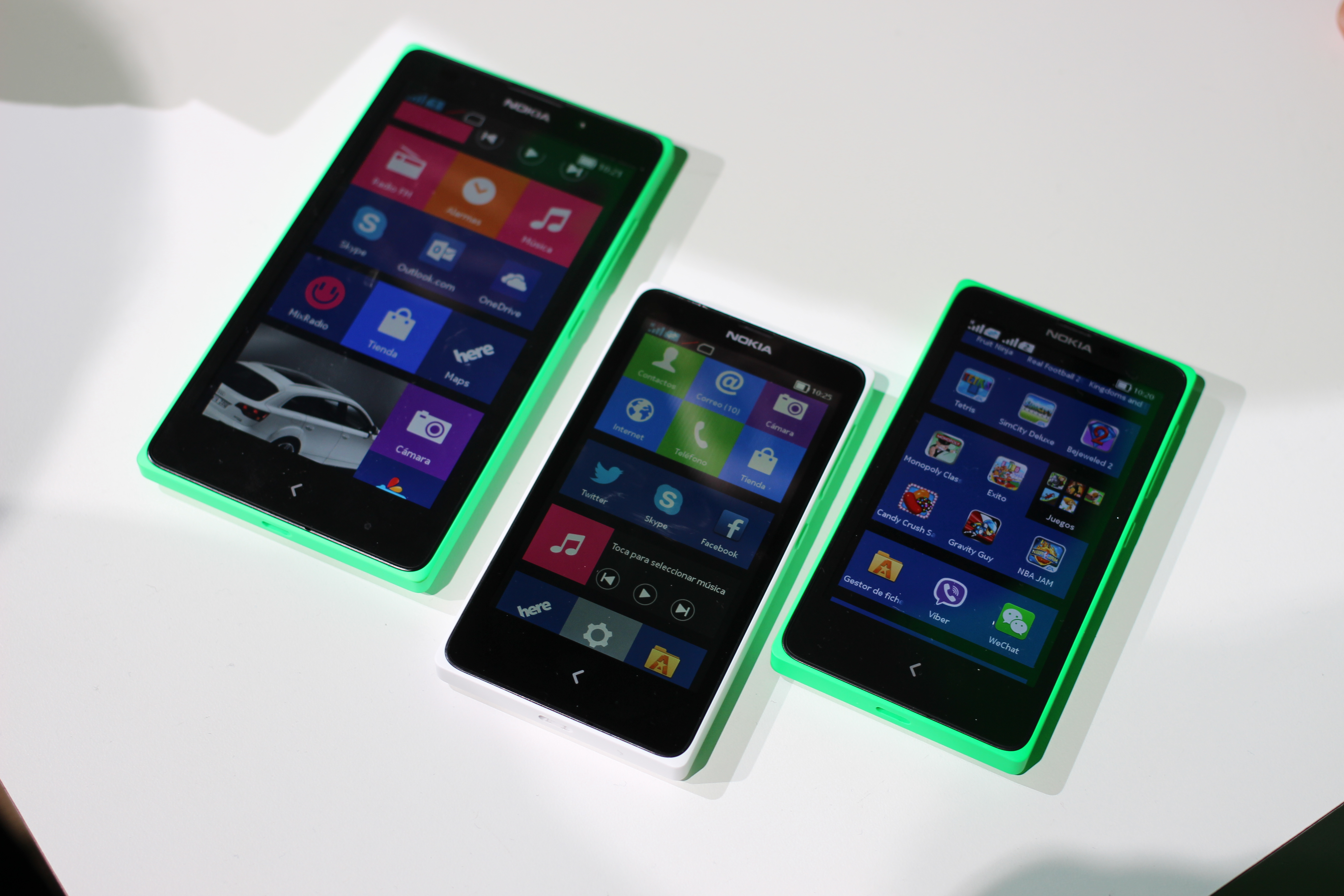 Nokia X and Nokia XL